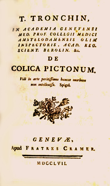 Page de garde de l'édition à Genève de "de colica pictonum" en 1757